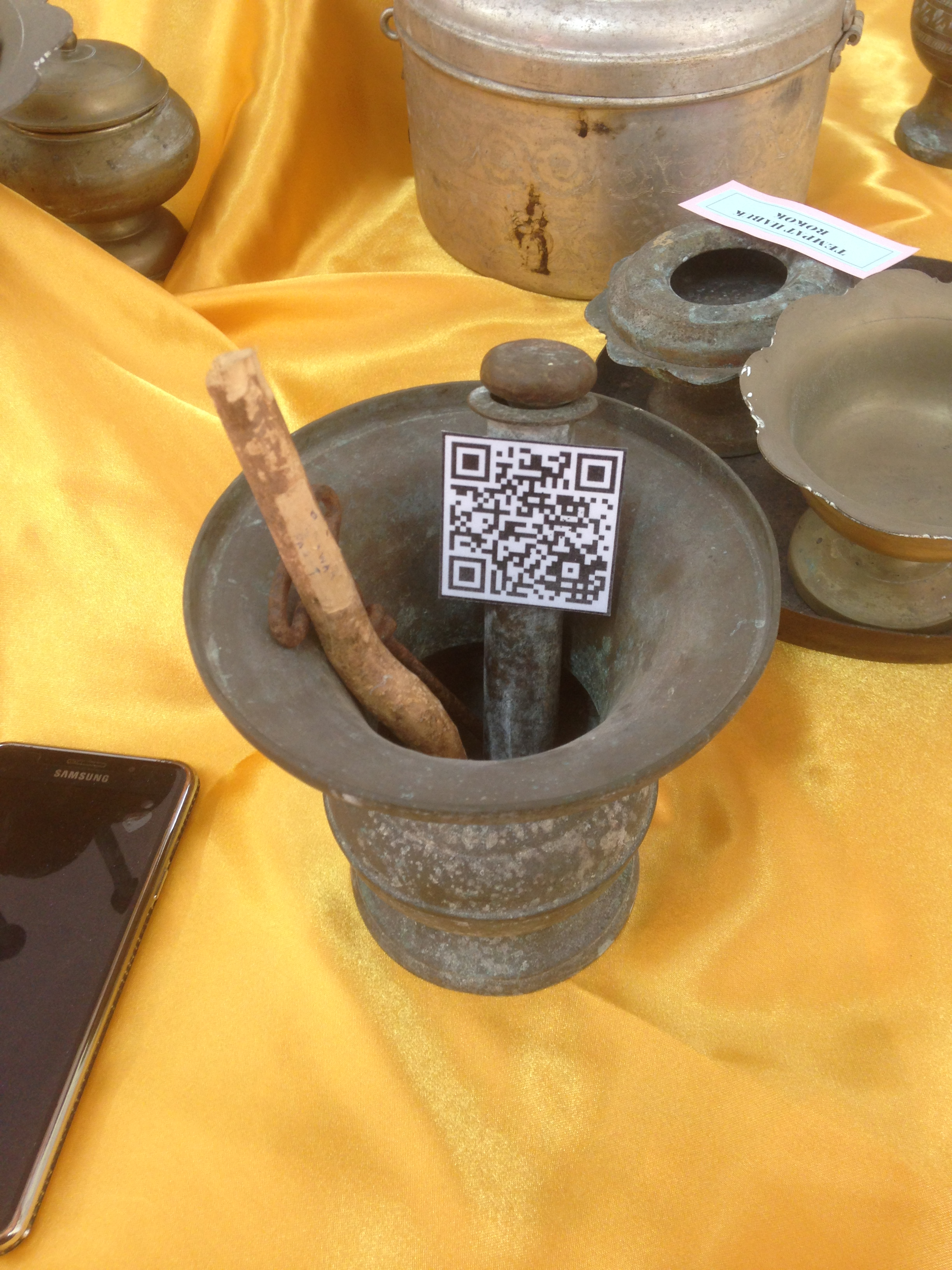 GOBEK